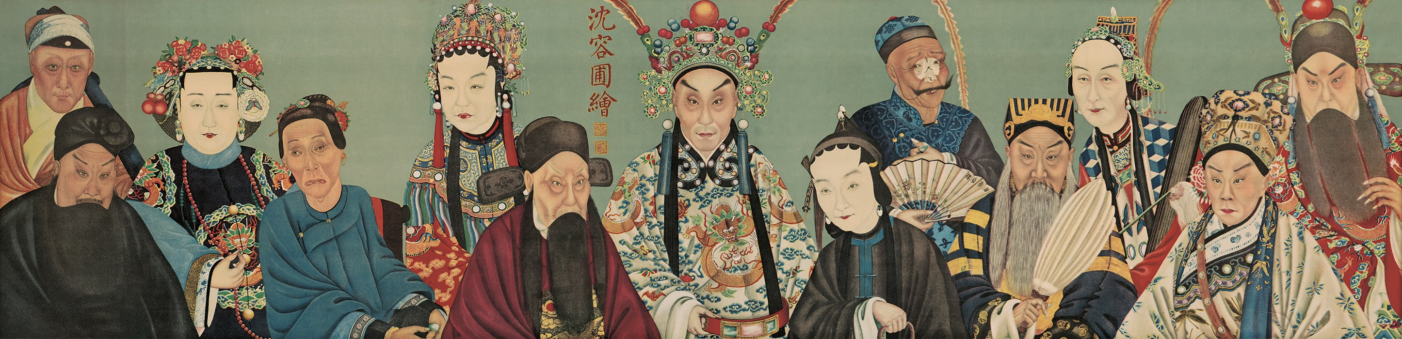 Картина «Тринадцать великих актёров поздней Цин» художника времён поздней Цин Шэнь Жунпу. Точные даты жизни художника неизвестны, но к моменту обнаружения картины в 1943 году его уже не было в живых.